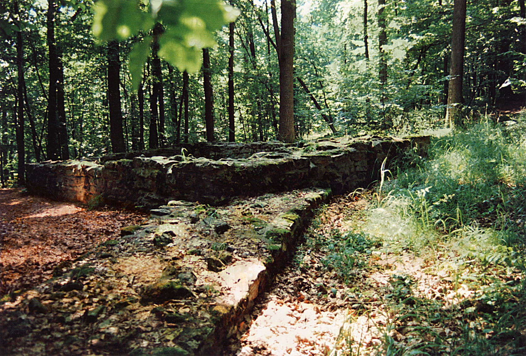 Limeswachturm Wp 14/5 auf dem Schloßbuck bei Gunzenhausen, Bayern. Zustand im Juli 1997.